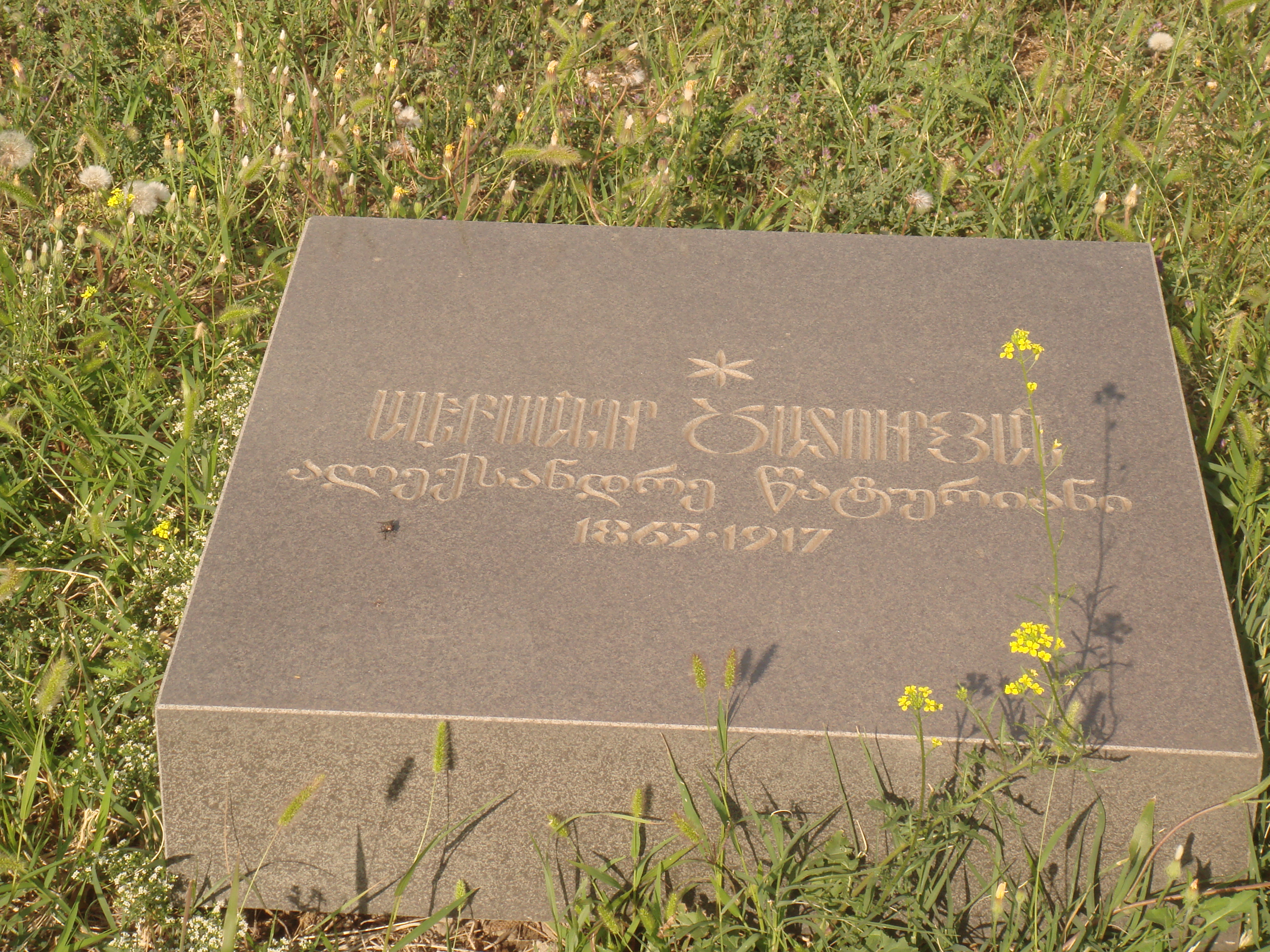 Խոջիվանքի պանթեոն